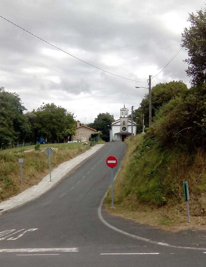 Vista do Souto, O Couto.